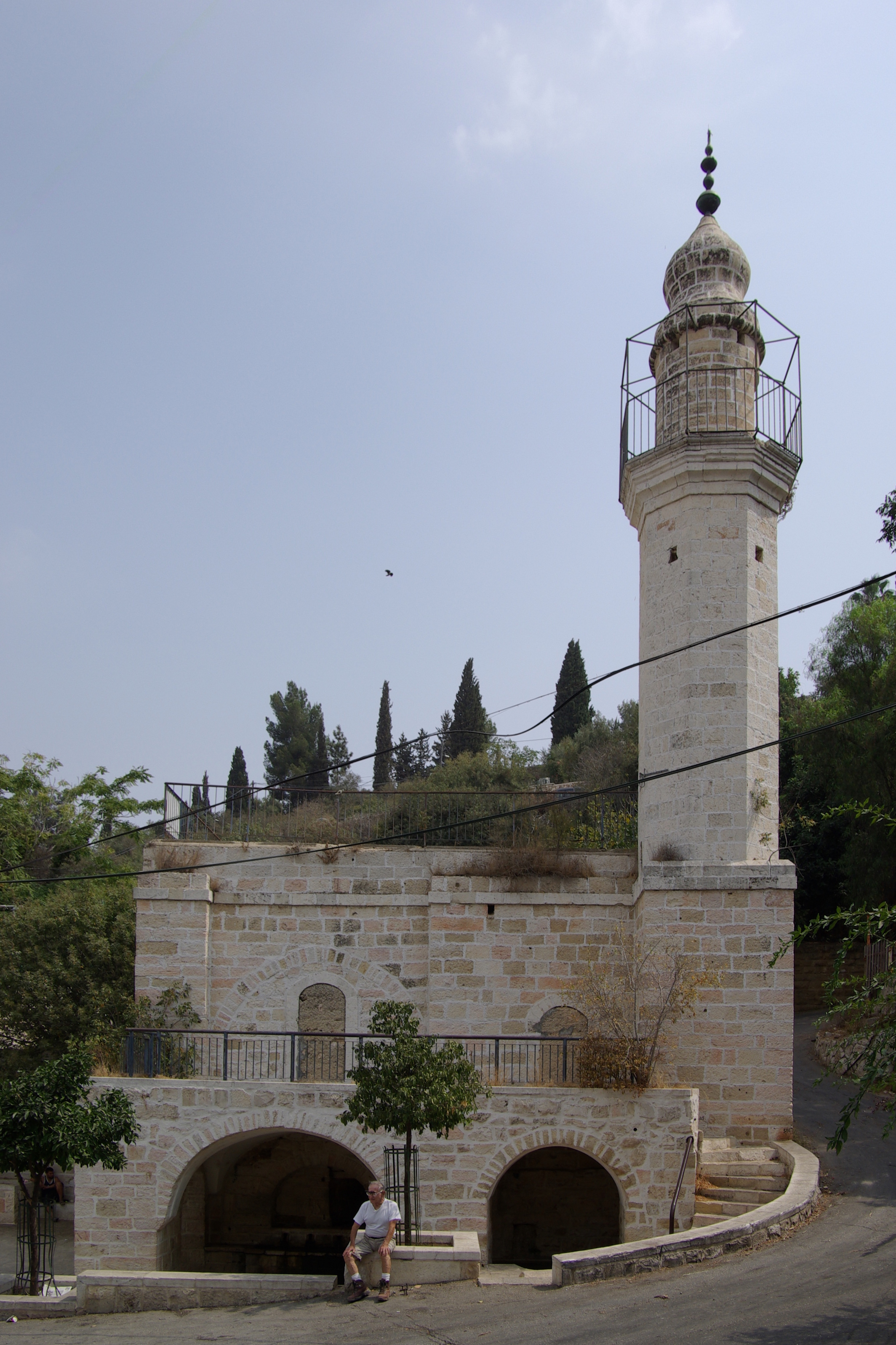 Ein Karem, Marienquelle